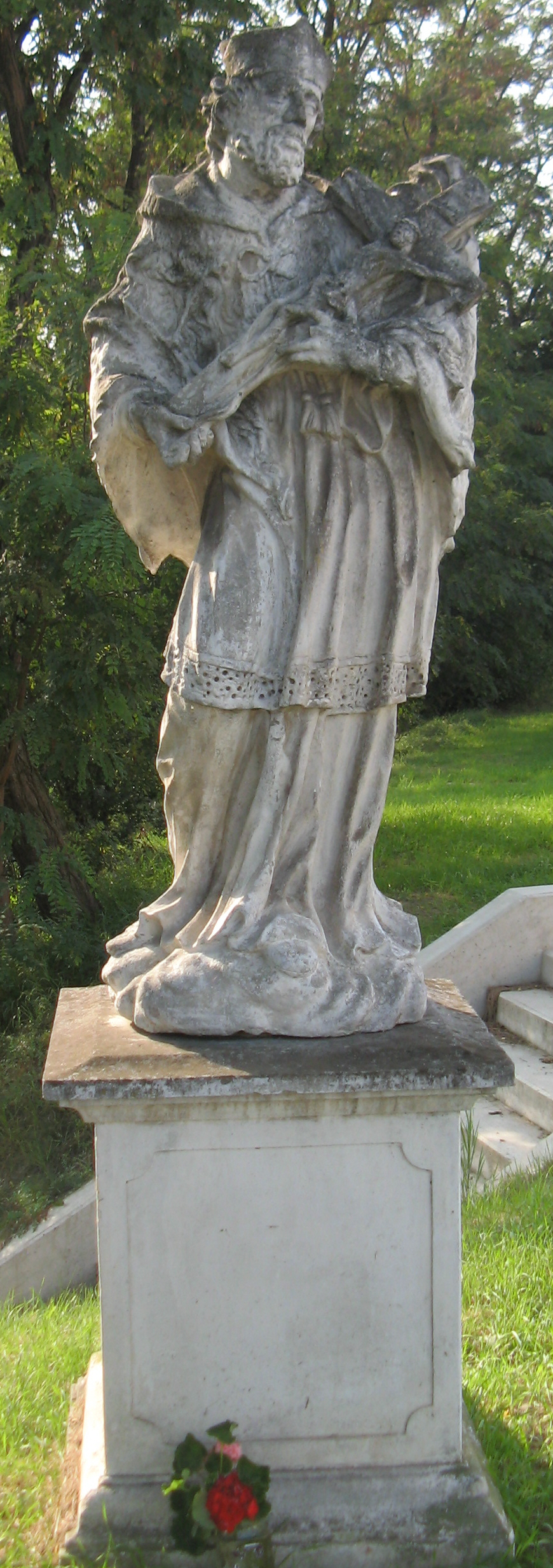 Johannes von Nepomuk-Statue, Himberger Straße bei der Liesingbrücke, Oberlaa, Wien-Favoriten